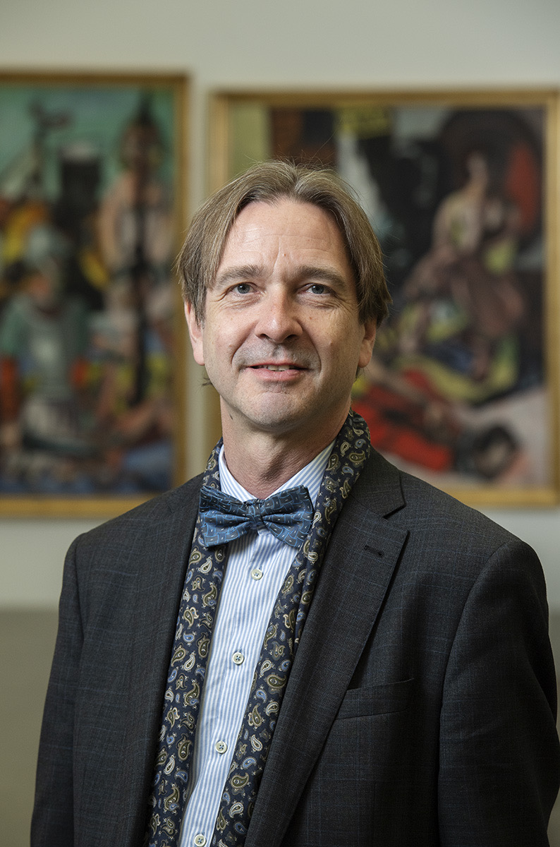 Bernhard Maaz, Generaldirektor der Bayerischen Staatsgemäldesammlungen